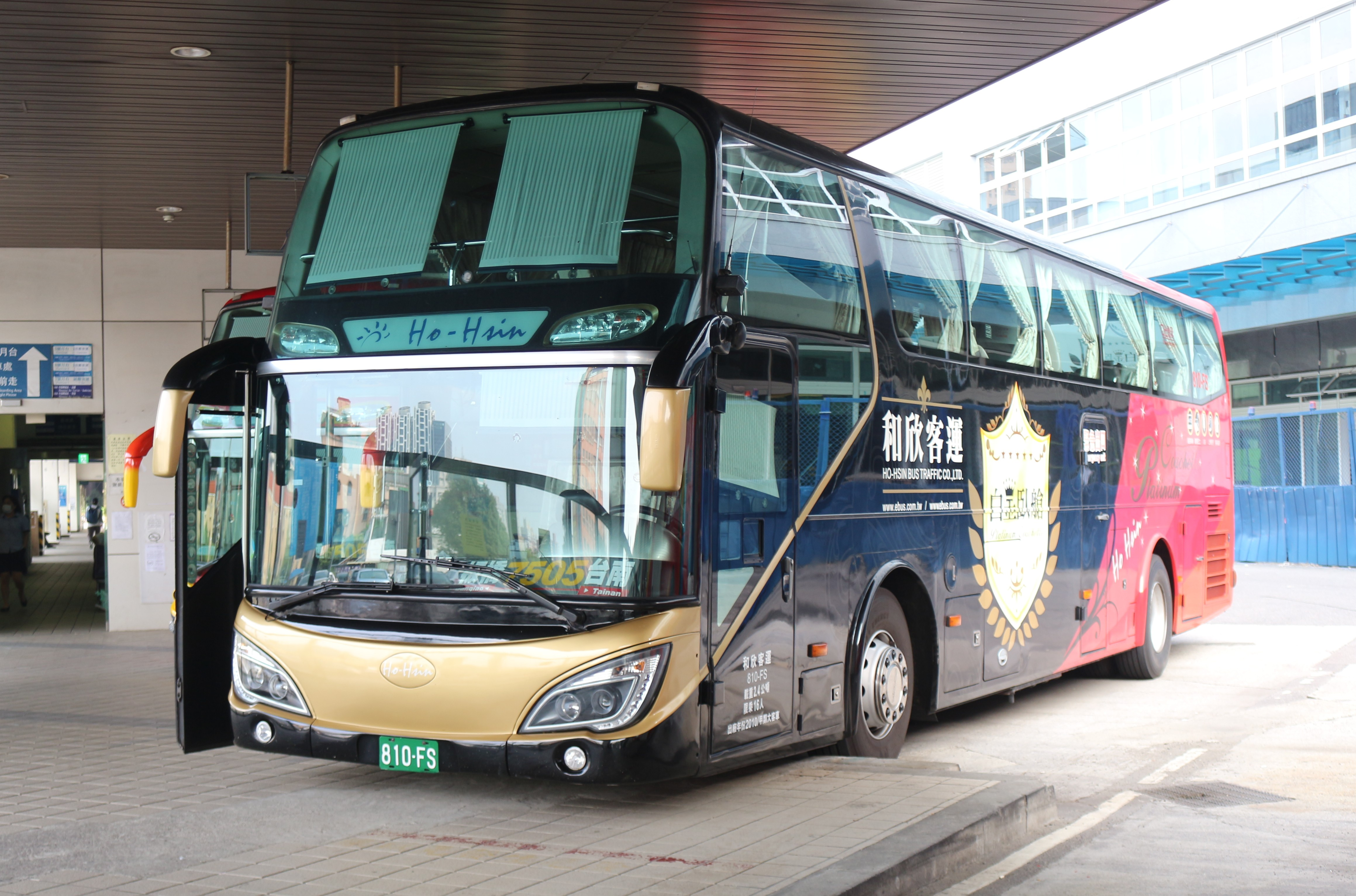 和欣客運 2011 SCANIA K380IB4X2NB 810-FS 7505